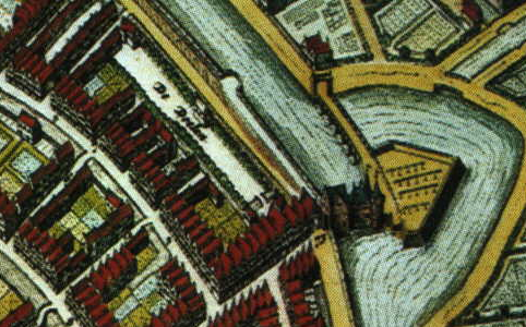 De doelen achter de Lange Tiendeweg te Gouda, detail kaart van Gouda